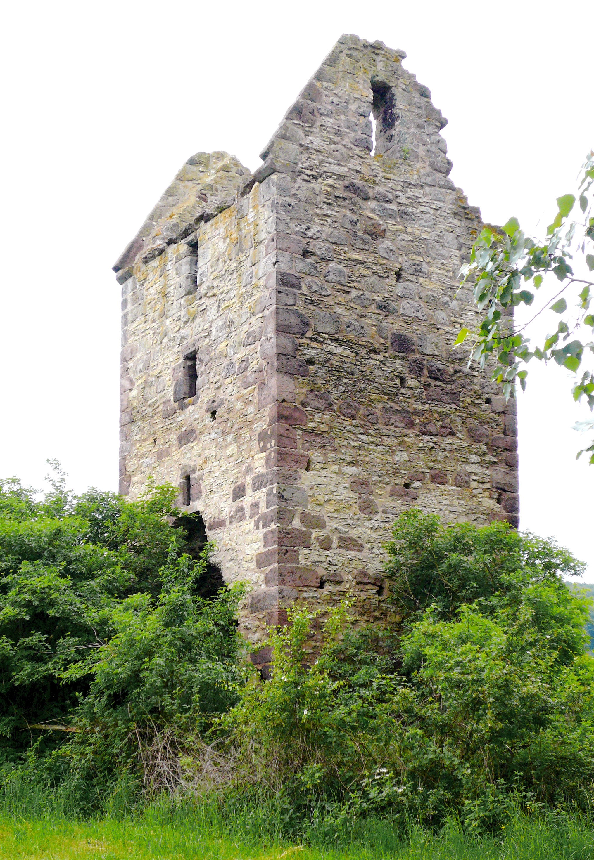 Ruine der Heilig-Kreuz-Kirche der Wüstung Moseborn bei Holzerode, Gemeinde Ebergötzen, Südniedersachsen.